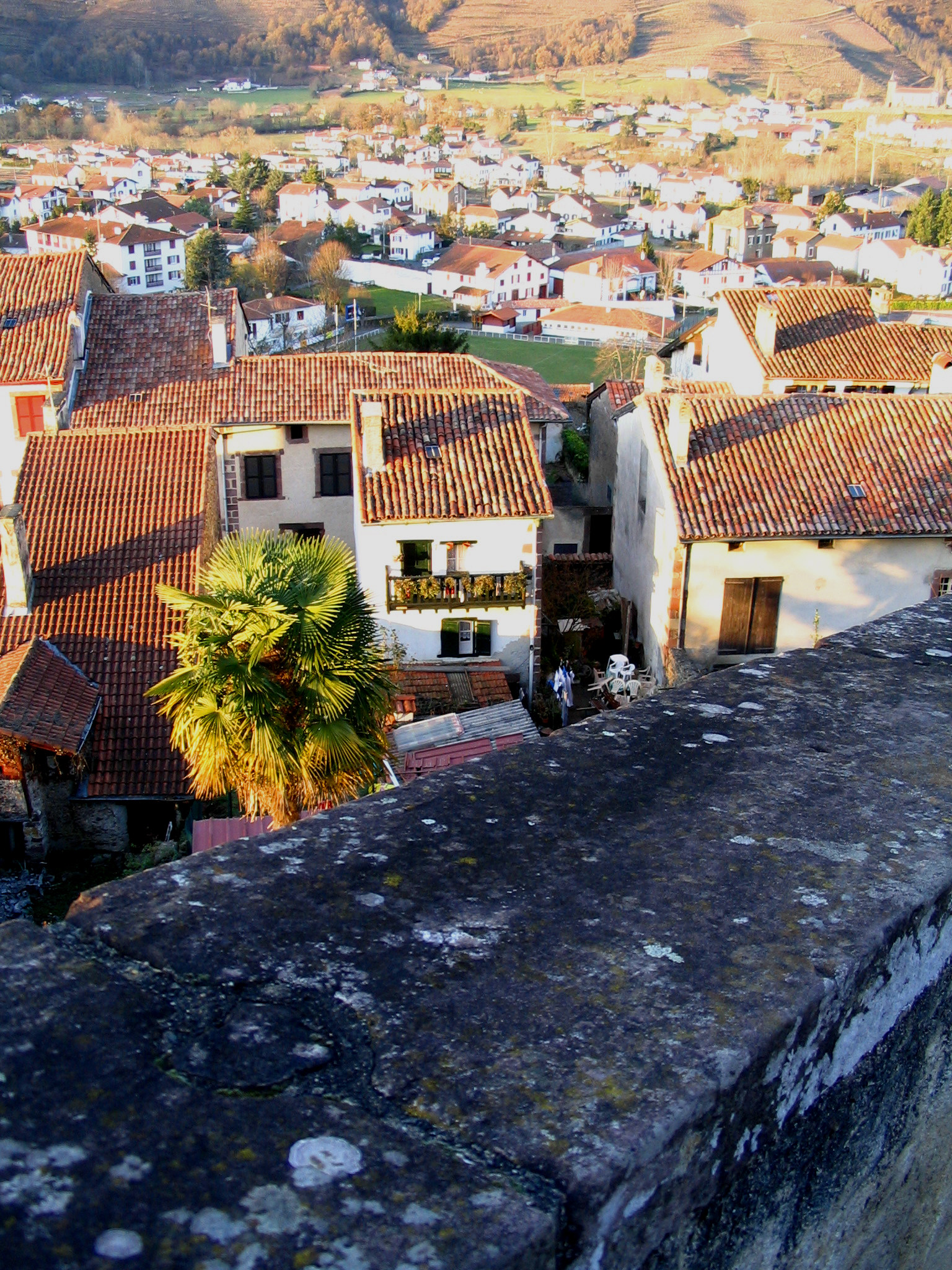 Vue depuis la citadelle - Saint-Jean-Pied-de-Port - Pyrénées Atlantiques - France Auteur/author: P.Charpiat - 2006